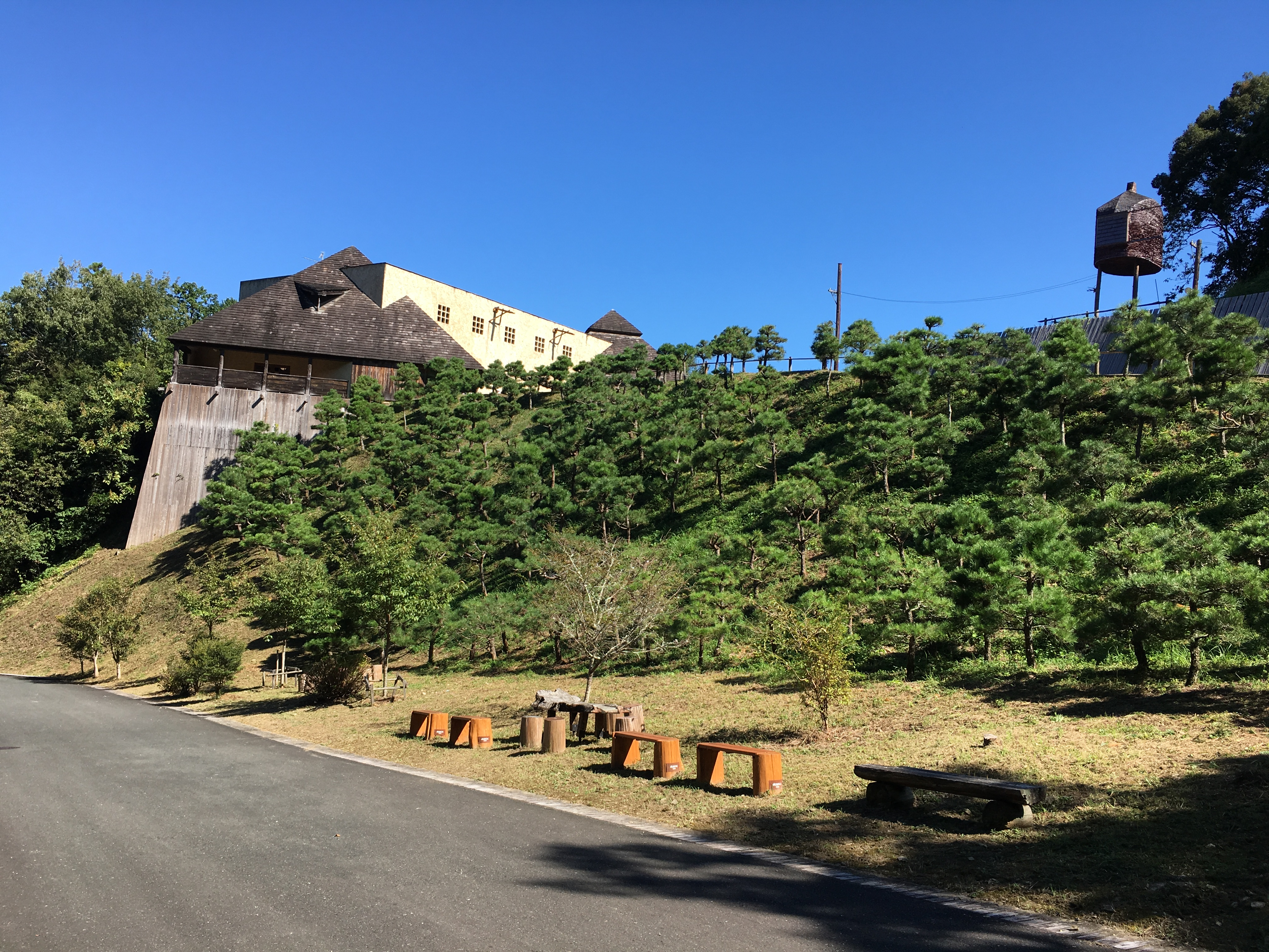 浜松市秋野不矩美術館（静岡県浜松市）外観